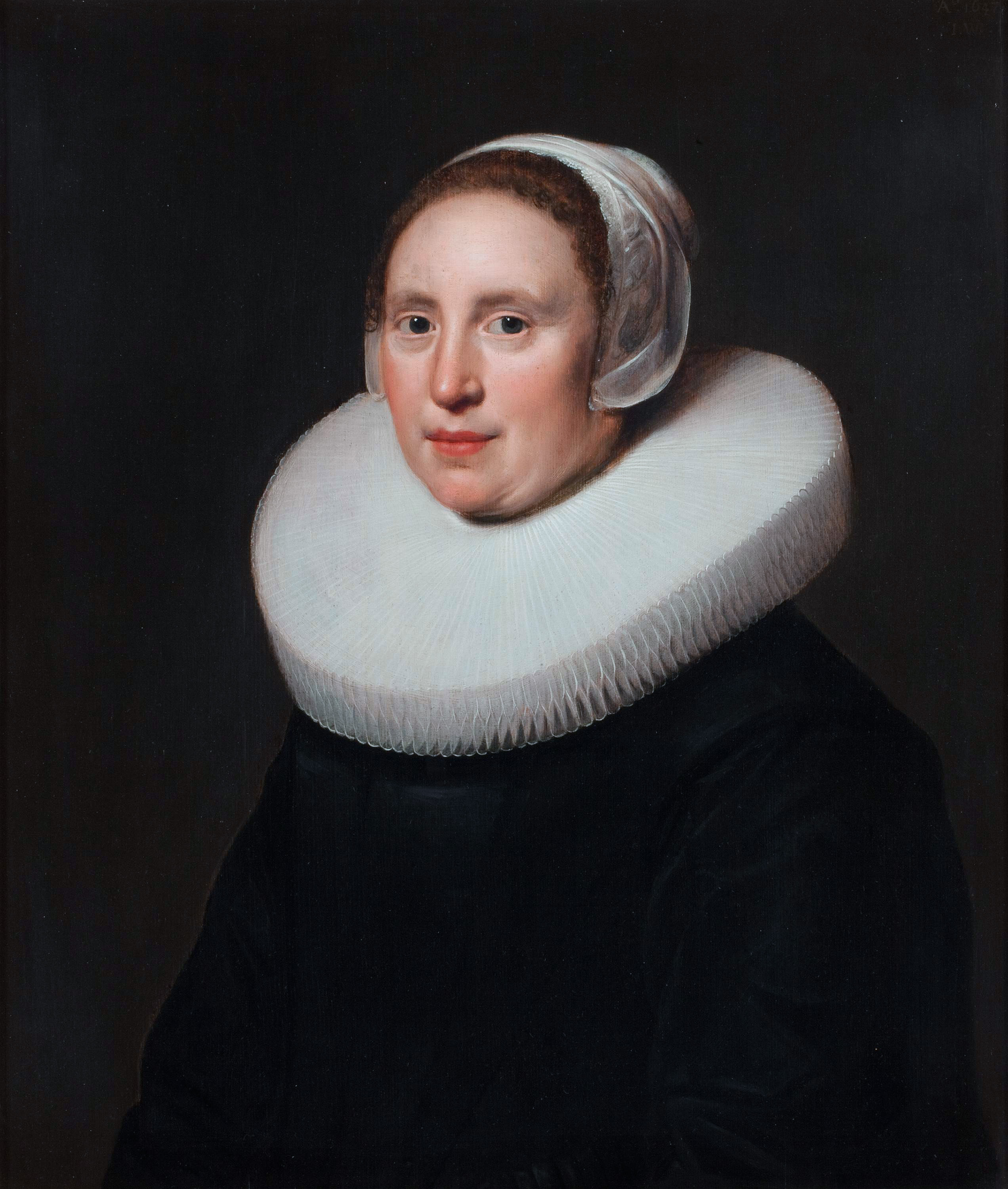 Portret van Susanna van Oostdijk, geschilderd door Jan Westerbaen de Oude (1647)